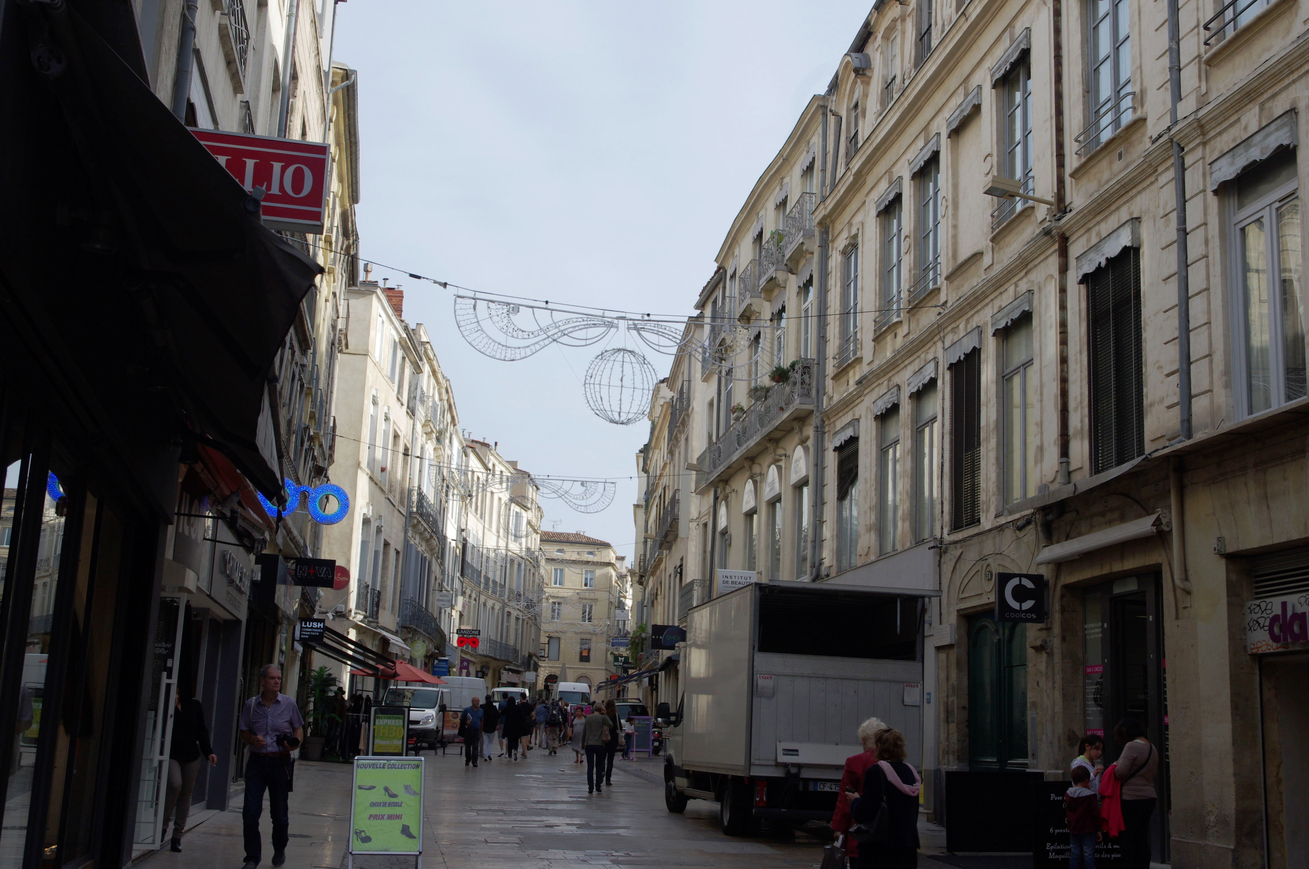 Montpellier - Grand Rue Jean Moulin.